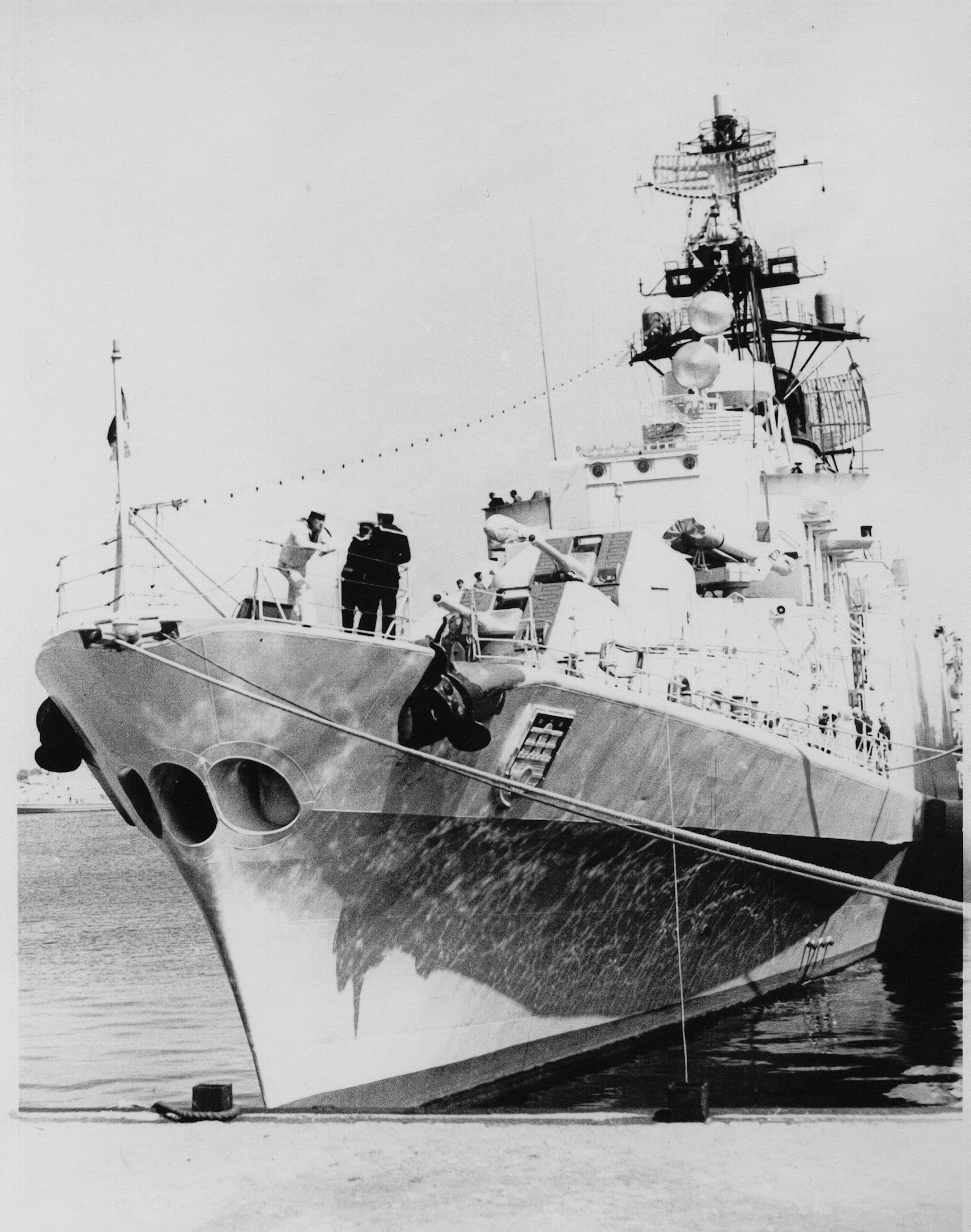 Bug mit Torpedorohren Z-181 F.Lang eig.Bild 1965